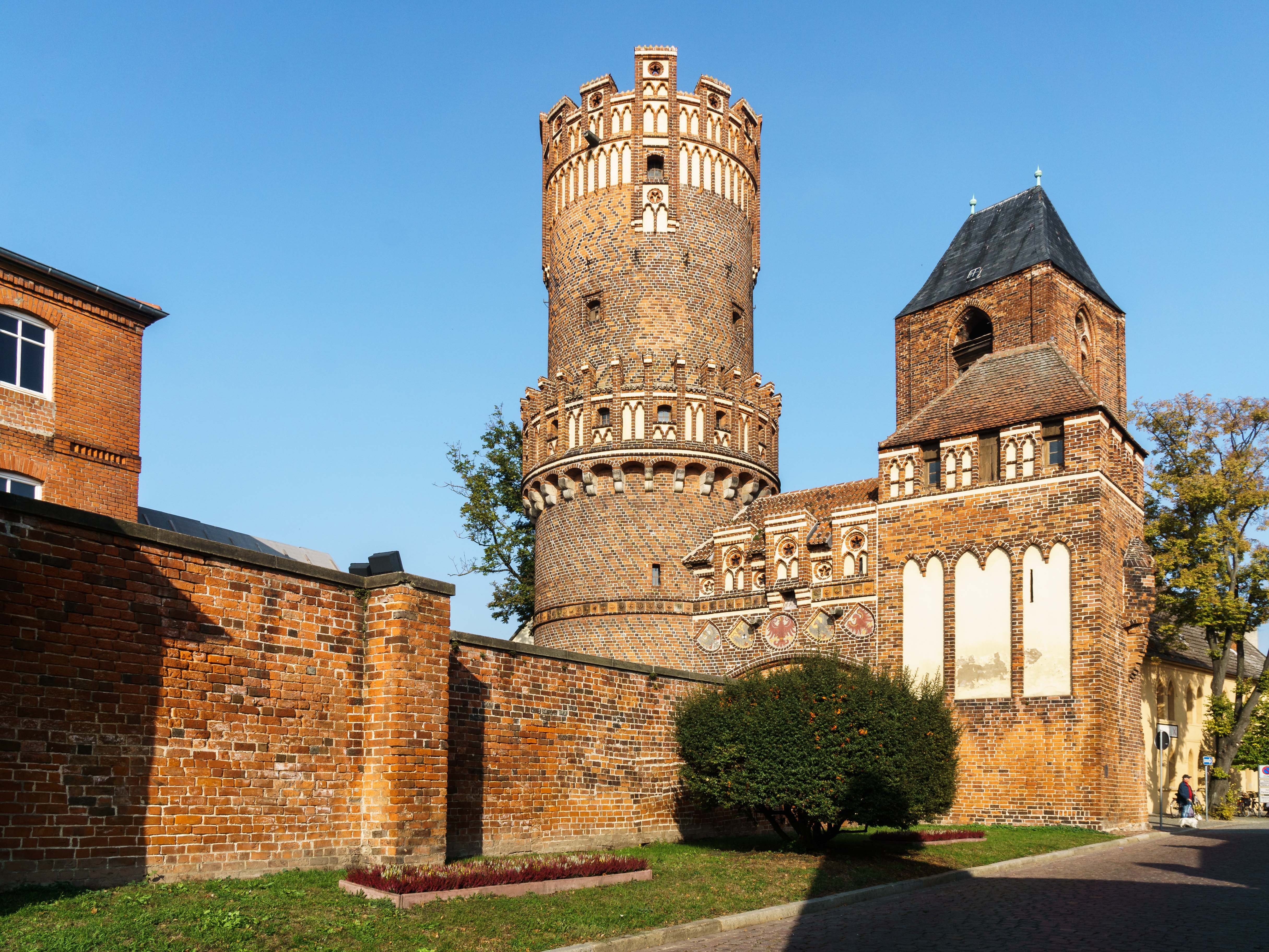 Stendaler Tor (Neustädter Tor), Am Neustädter Platz in Tangermünde